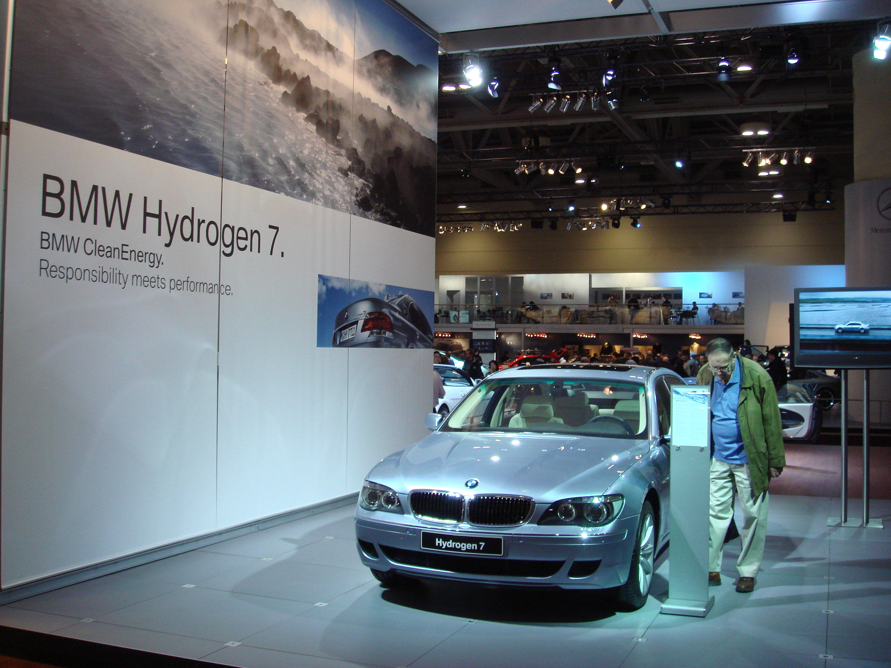 BMW Hydrogen 7